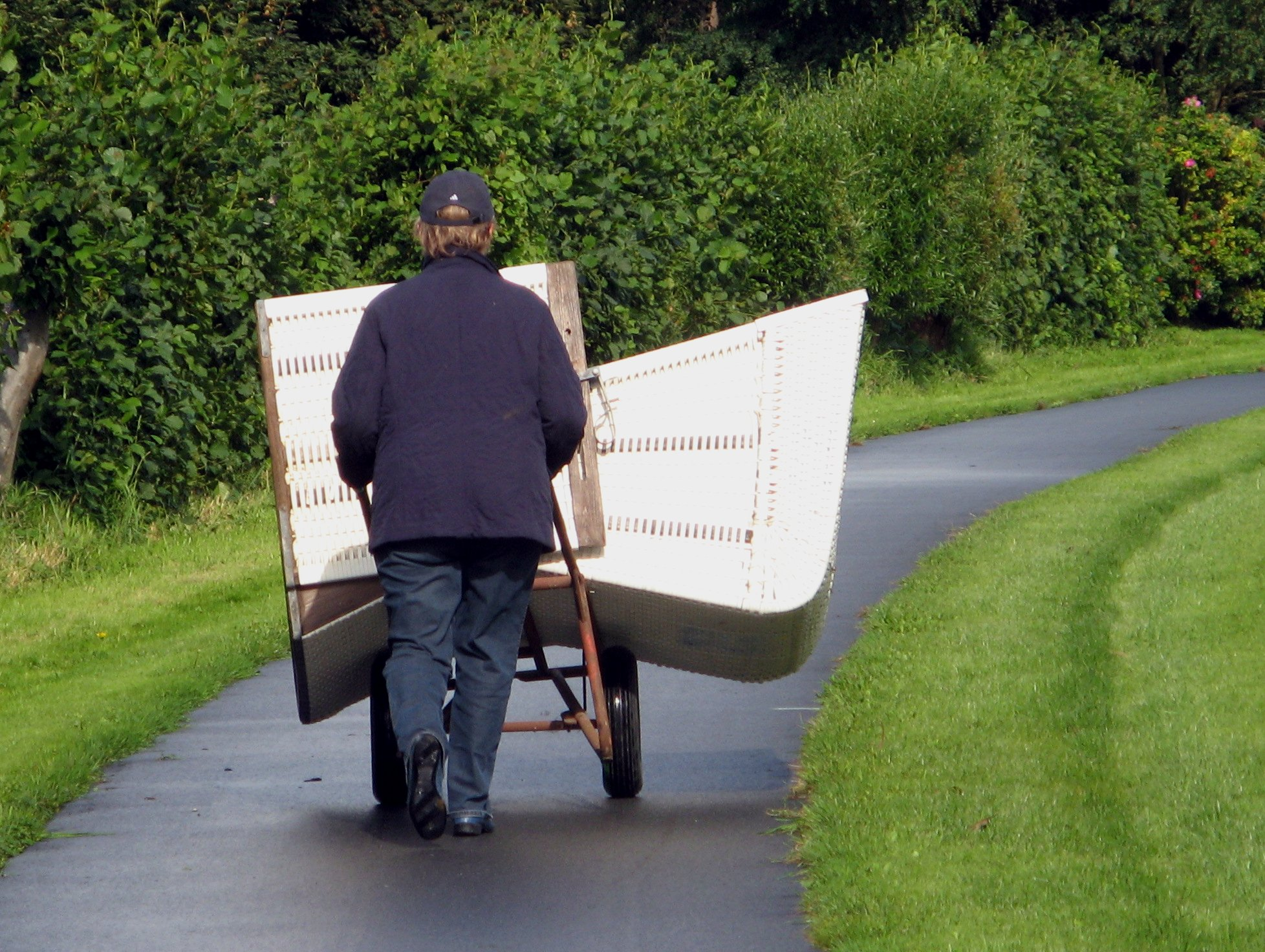 beach chair in Strübbel